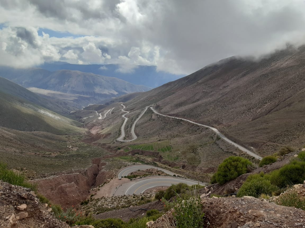 mini vacaciones en mi Jujuy- febrero2019